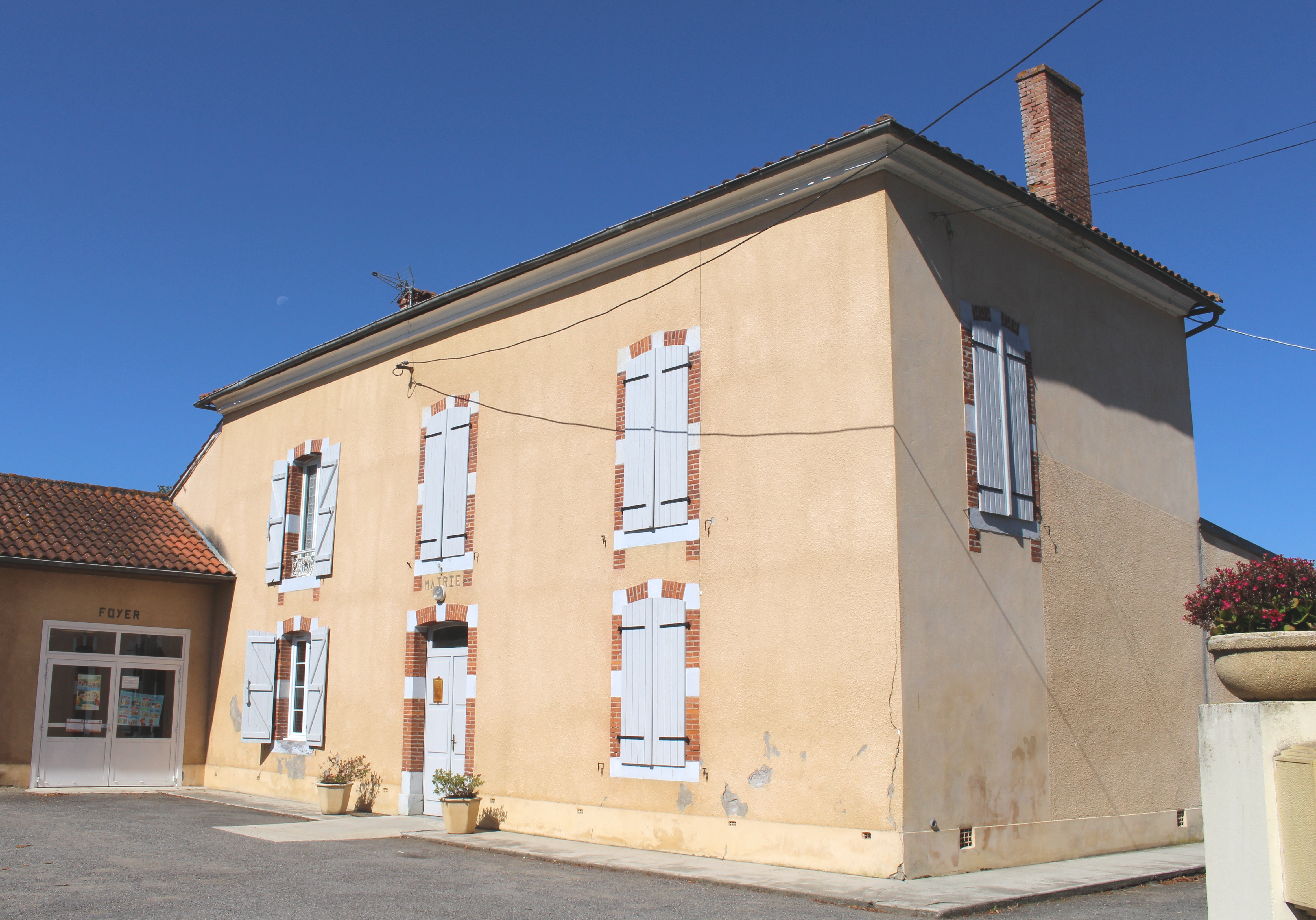 Mairie de Lescurry (Hautes-Pyrénées)